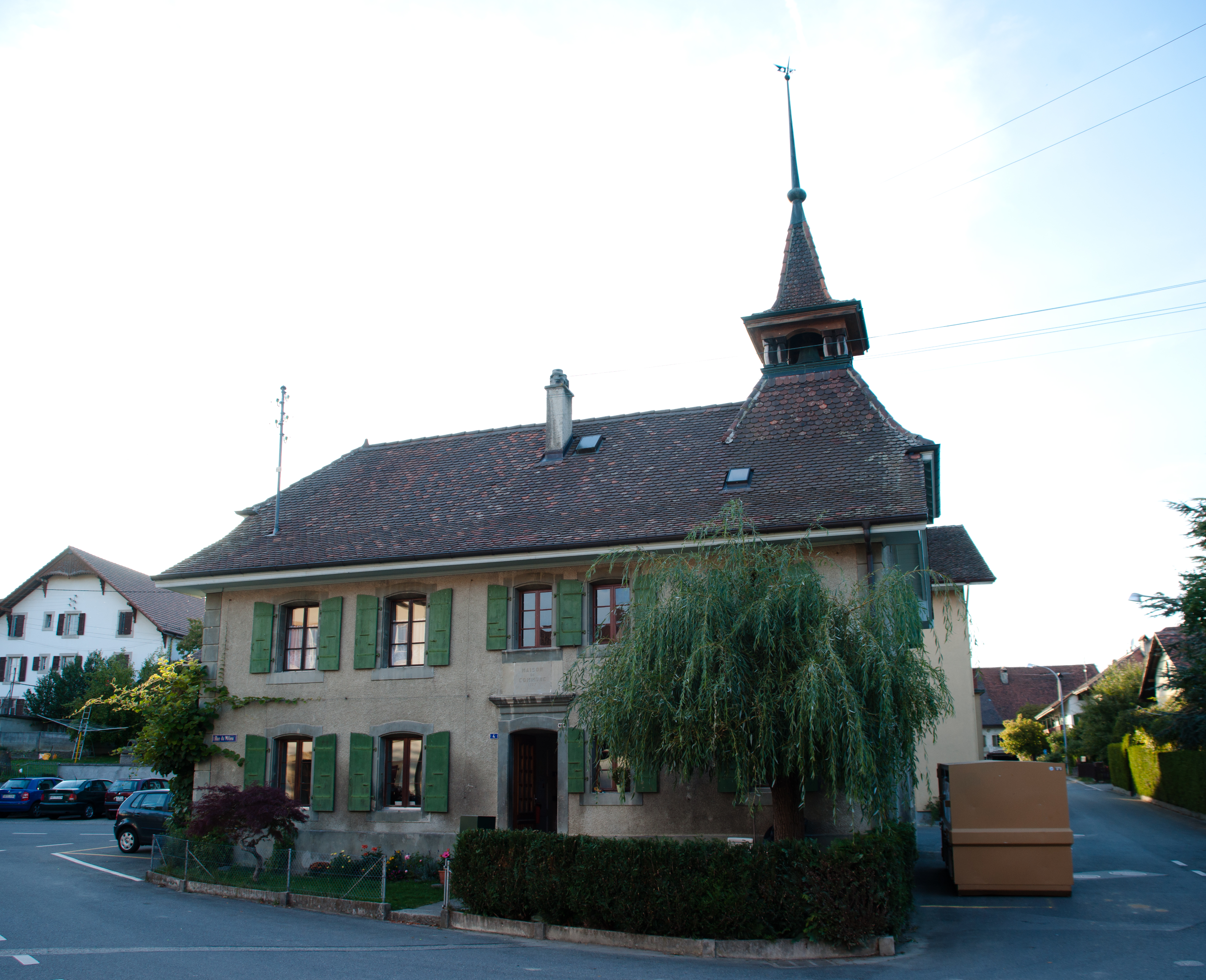 Ancienne maison de commune d'Essertines-sur-Yverdon, canton de Vaud, Suisse.